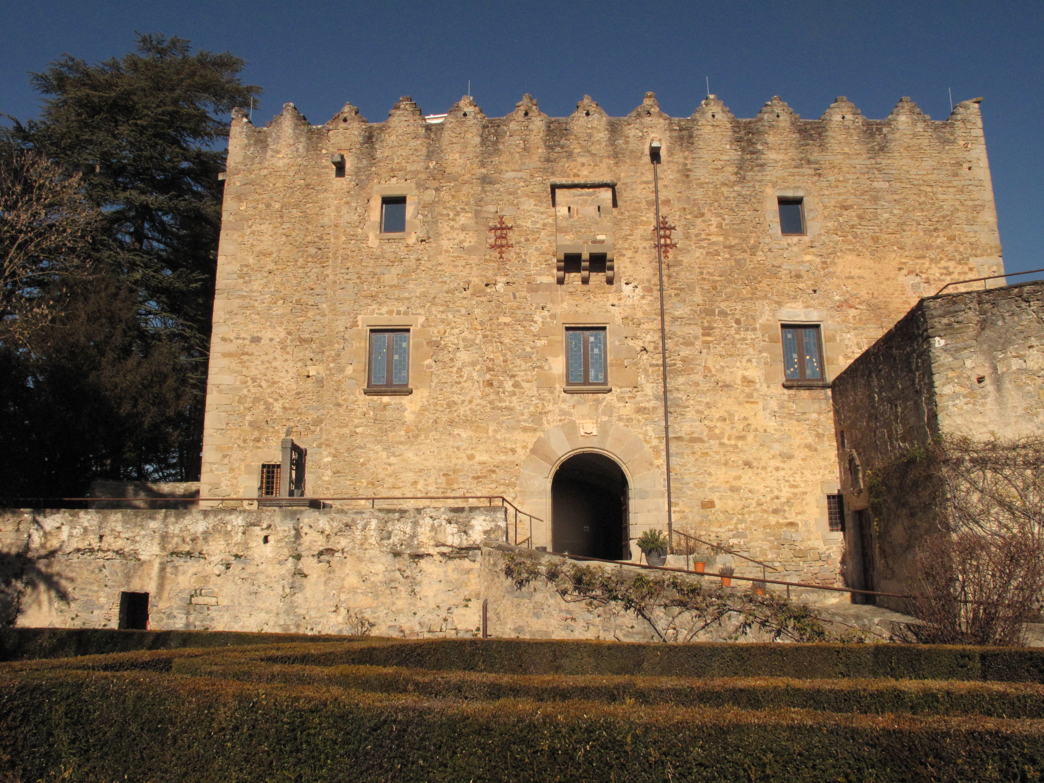 Castell de Montesquiu (Osona)